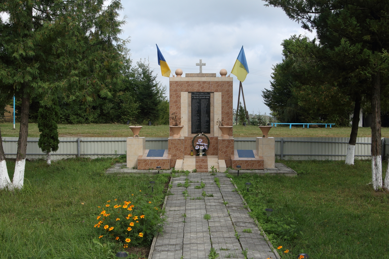 Пам'ятник загиблим у Великій Вітчизняній війні у с. Середній Майдан, Надвірнянський район